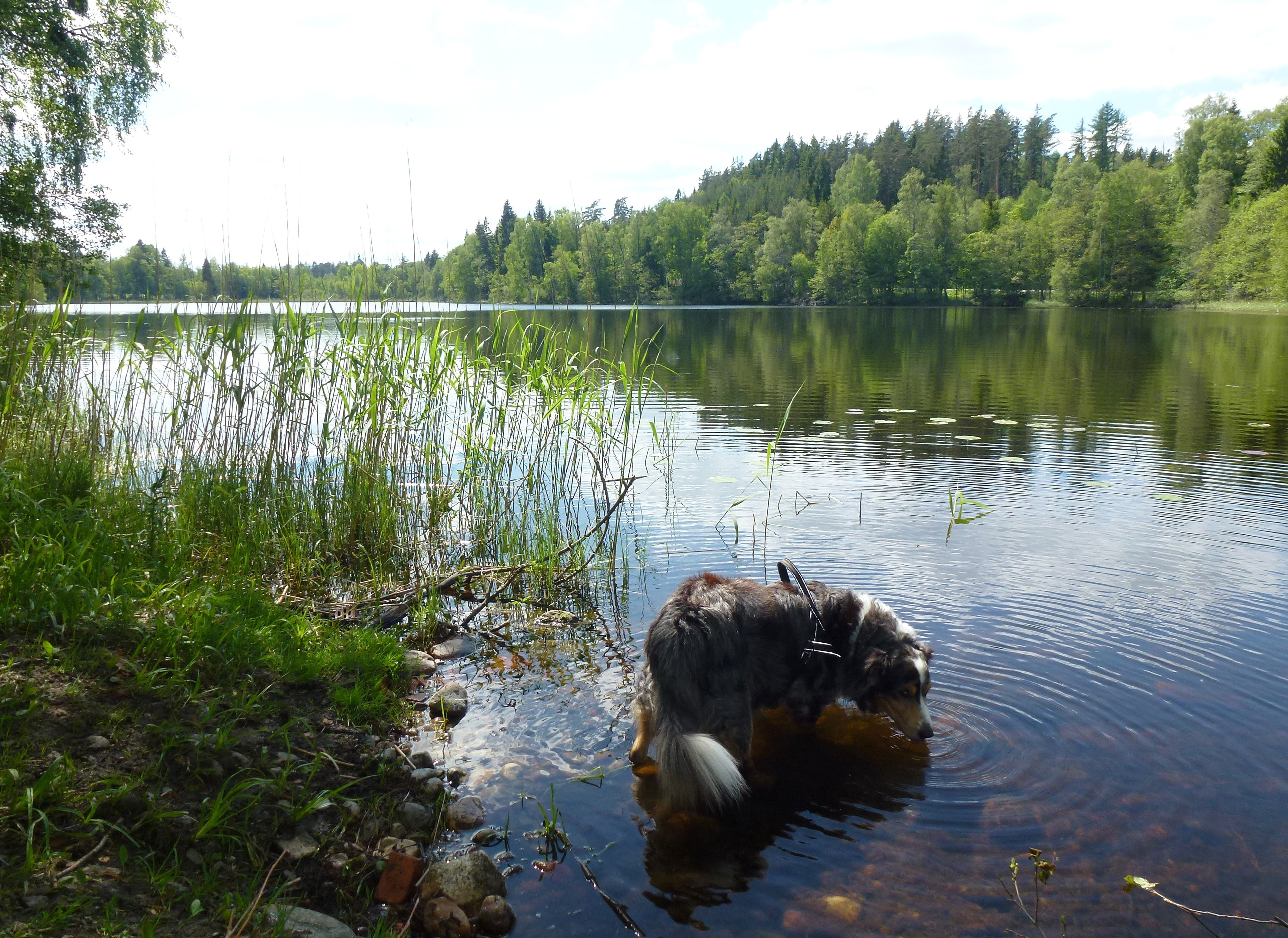 Kvarnsjön (Grödinge socken, Södermanland)